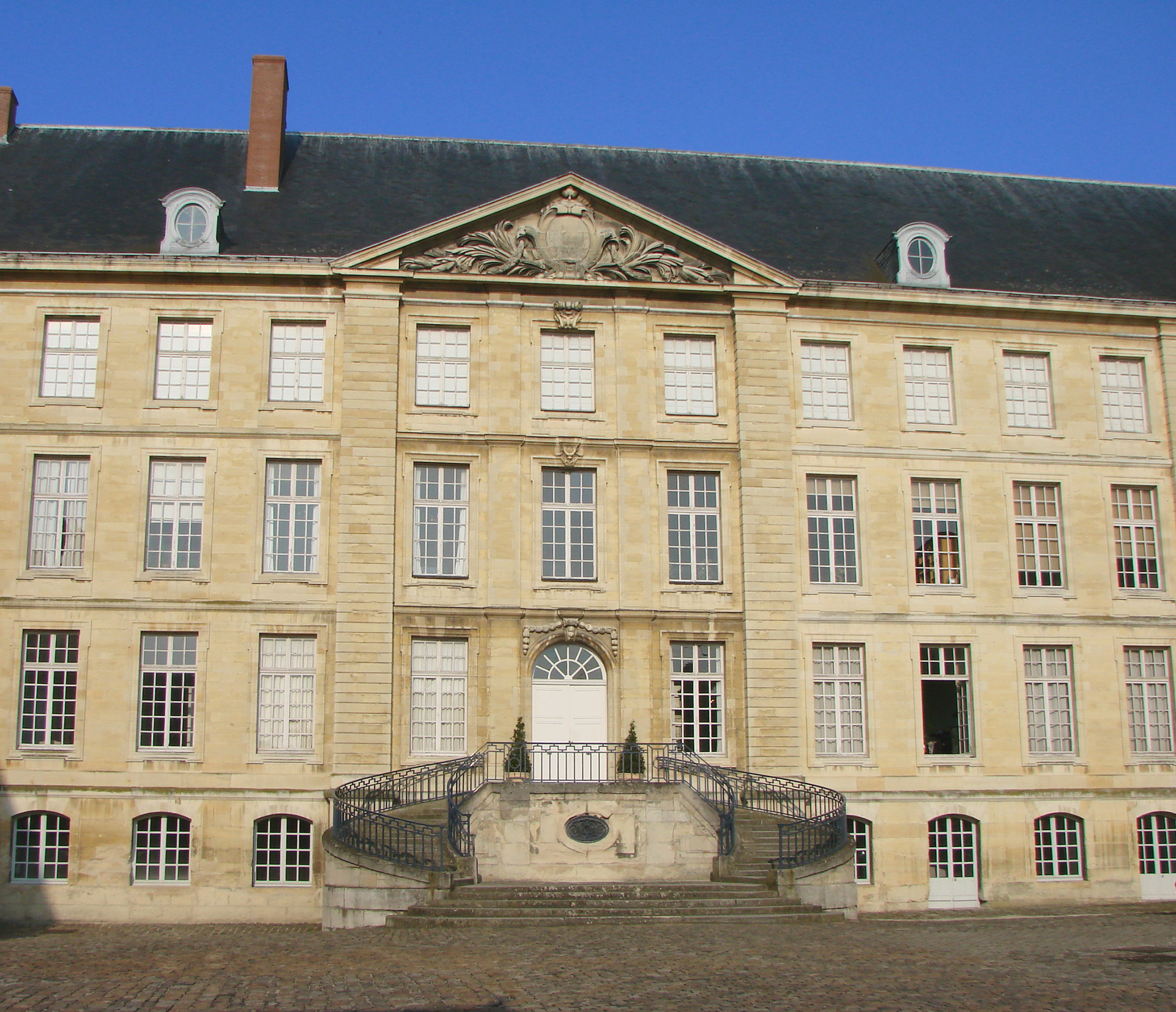 Musée St Rémi à Reims. Cour d'honneur:façade Louis XVI. Le musée est installé dans le cloître attenant à la basilique St Rémi.